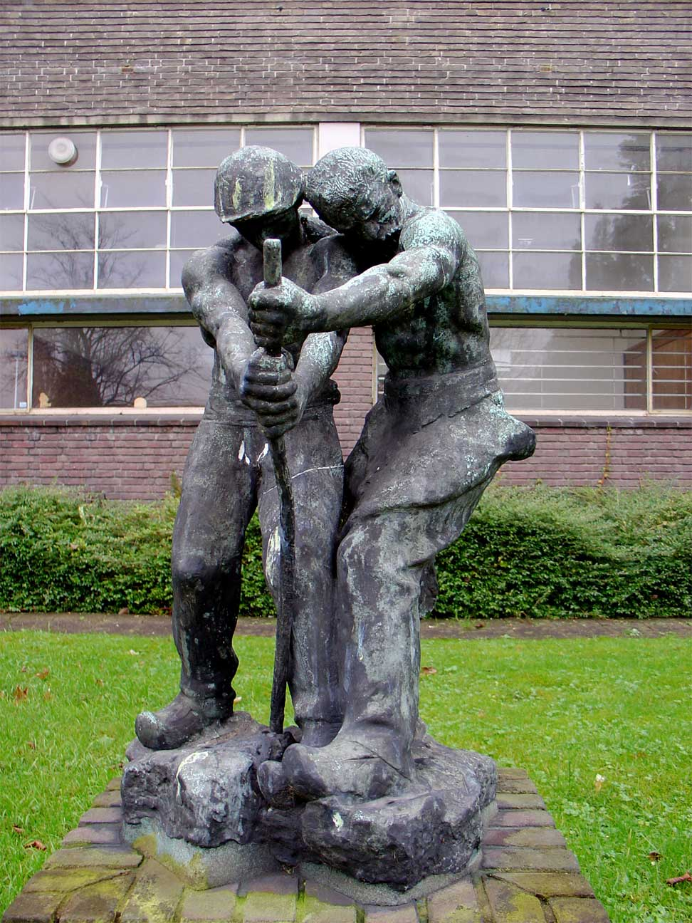 Samenwerking (brons) door Henri Levasseur - Graaf Florisweg 64, Gouda. Het kunstwerk is weggehaald, na de verbouwing tot appartementen, is het in 2017 teruggeplaatst.